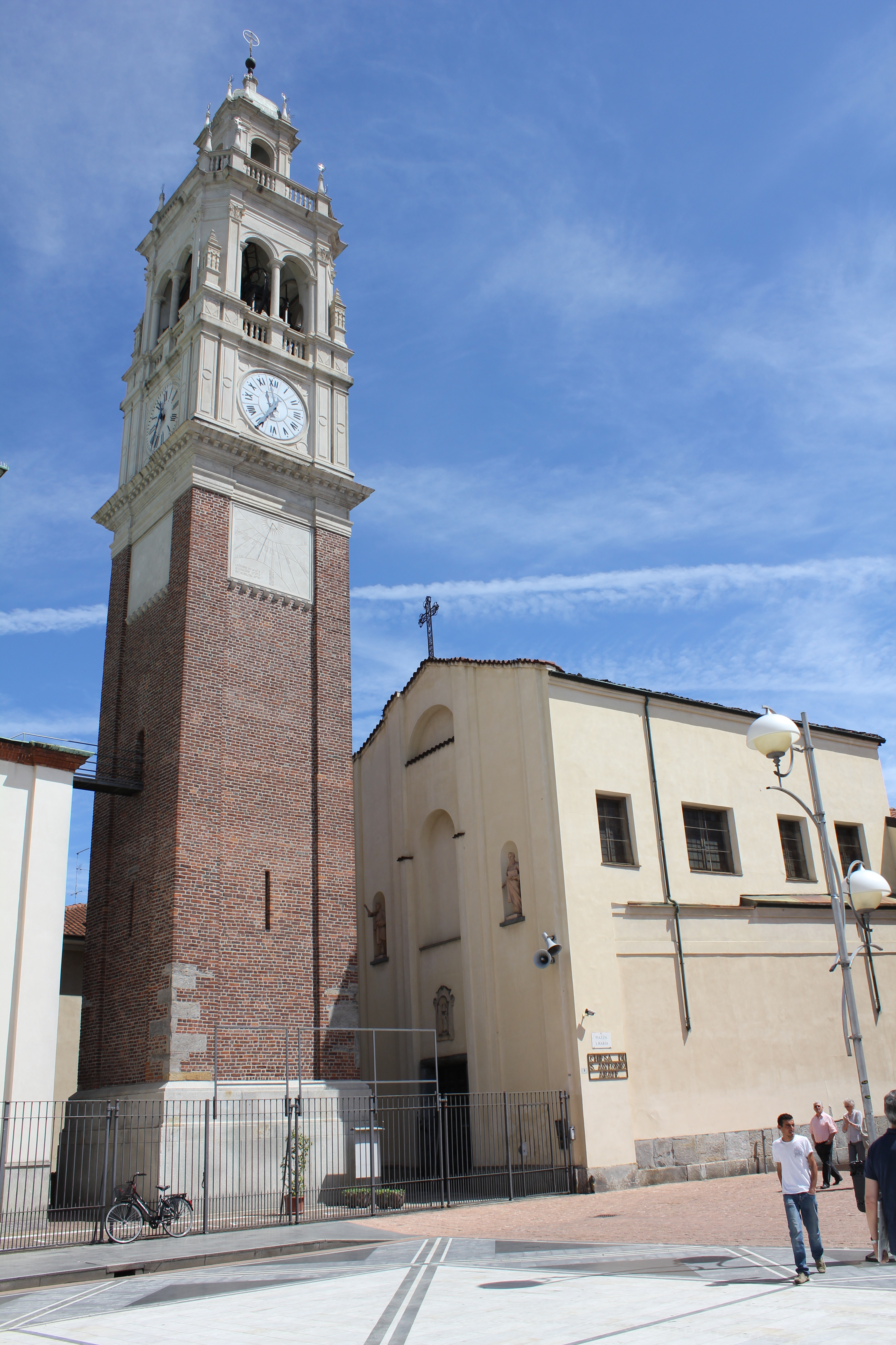 chiesa di Sant'Antonio abate (Busto Arsizio)